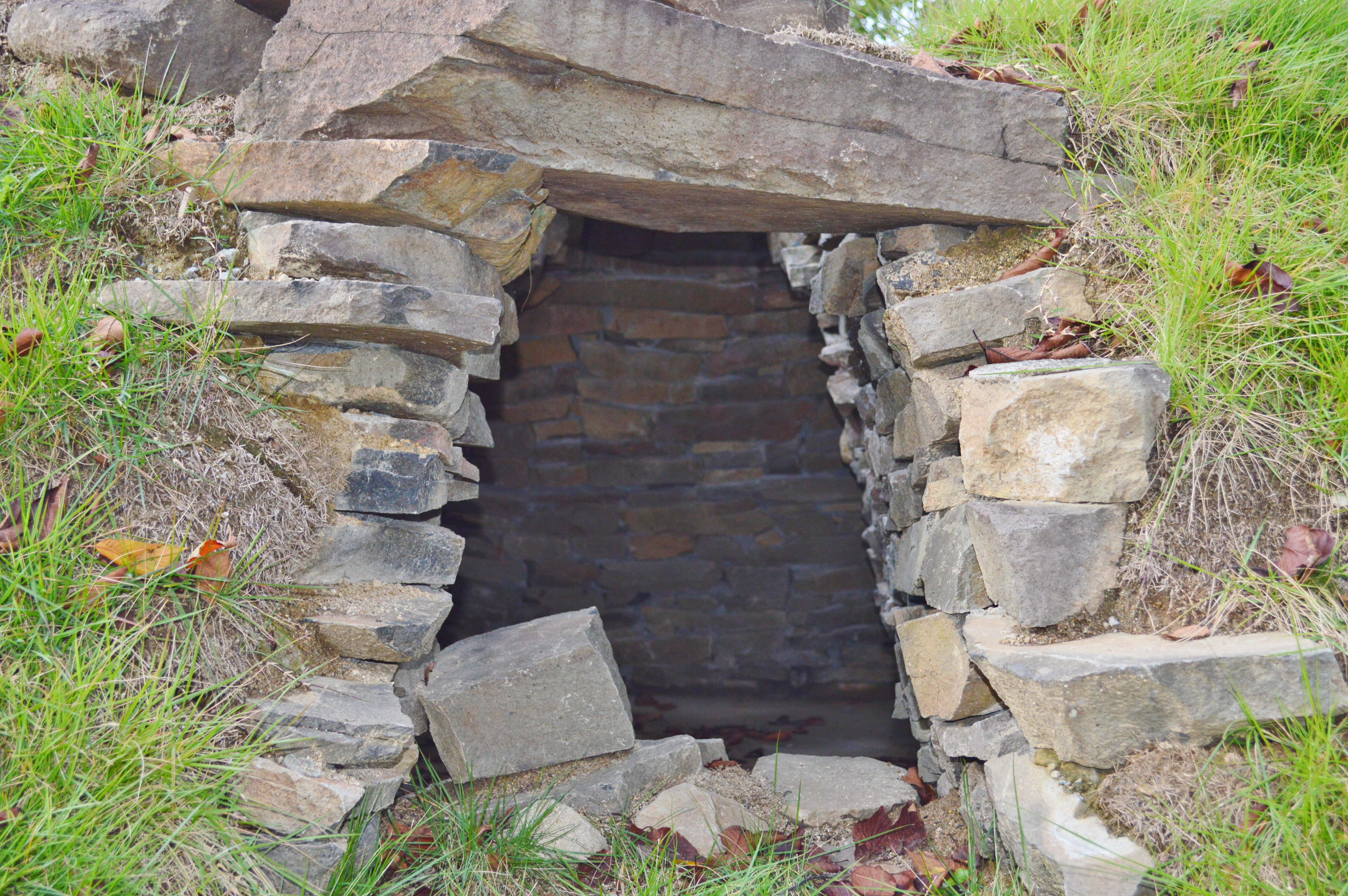 藤の森古墳 移築石室内部